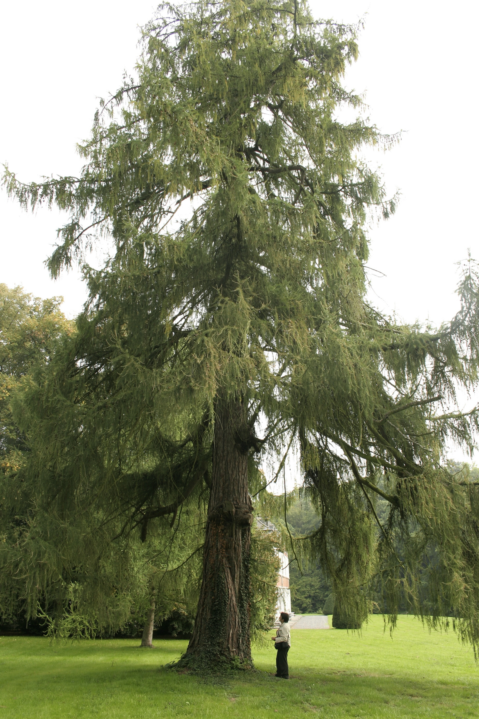 Écaussinnes-d’Enghien, Château de la Folie - Le grand mélèze d'Europe (Larix decidua). Circonférence mesurée à 1m50 du sol: 431 cm (2007) Hauteur : 29m (1986) Particularité: le plus gros arbre de son espèce en Belgique. Position exacte : - Google Maps - Google Earth